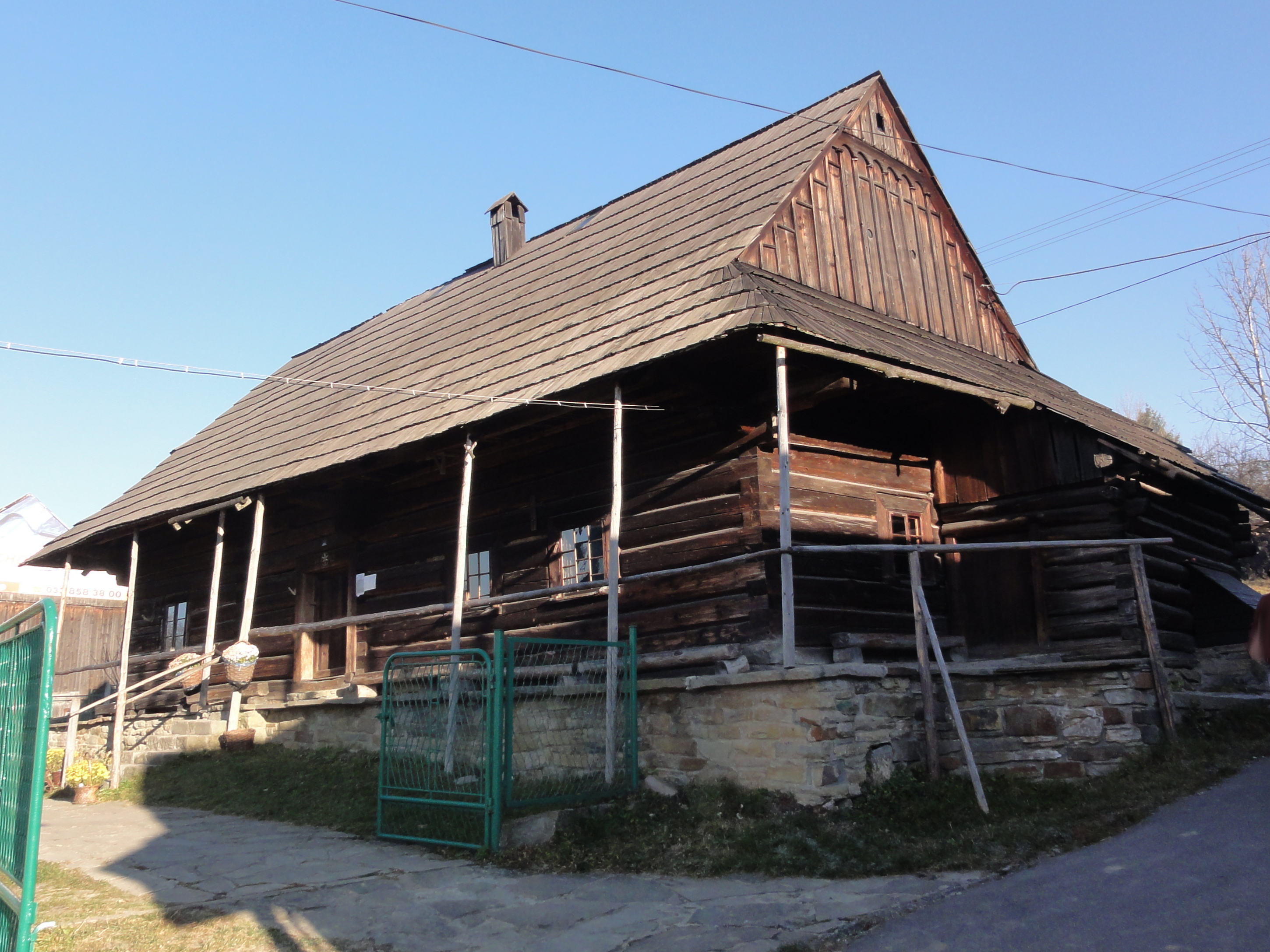 Muzeum Chata Kawuloka w Istebnej Wojtoszach